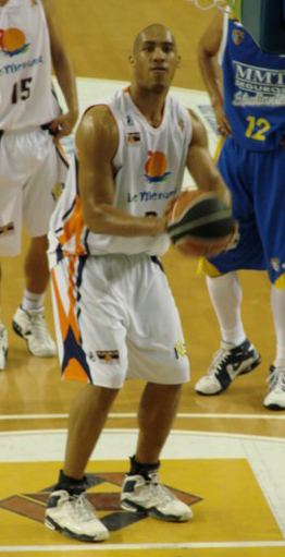 Chris Moss-Menorca Basquet 06/07